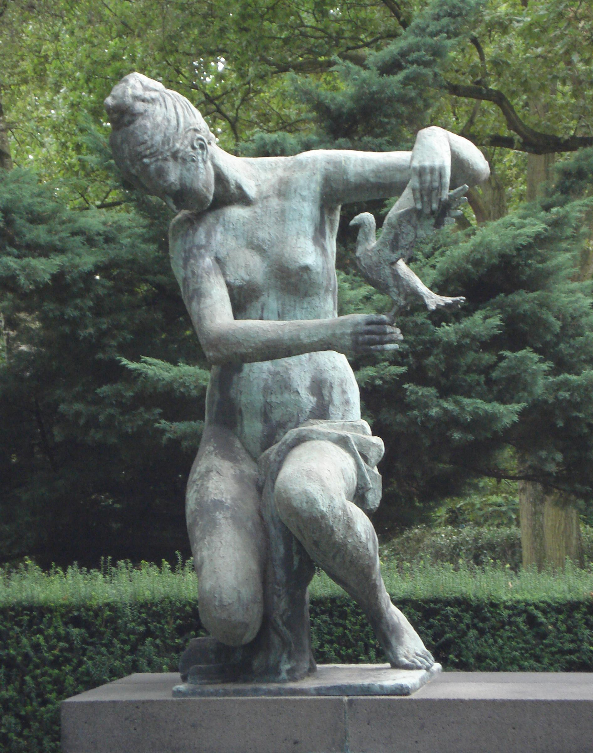 Rotterdam Crooswijk, begraafplaats. Monument voor Rotterdamse burgerslachtoffers, "Knielende vrouw met duif" van Cor van Kralingen. Rotterdam/The Netherlands.